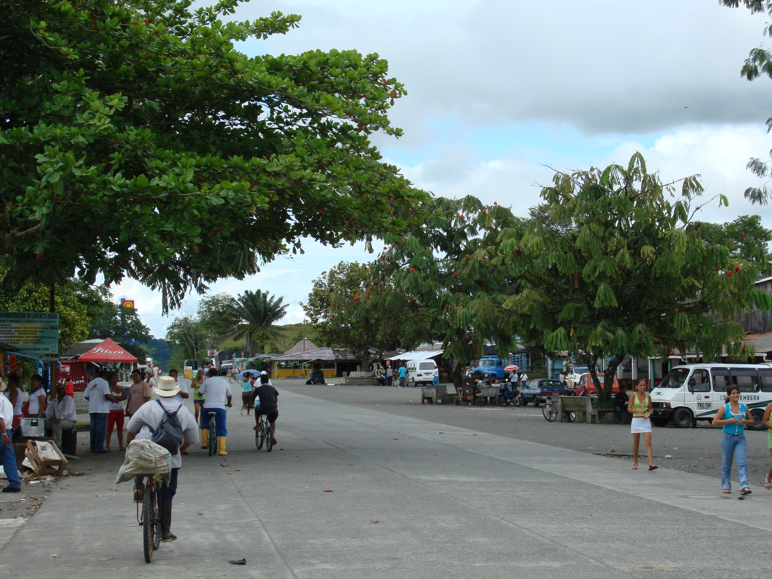 Calle Principal MUTATA ANTIOQUIA